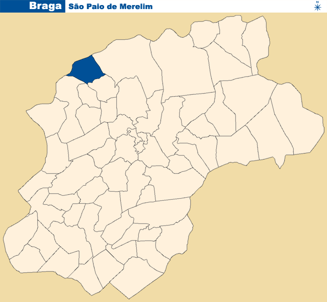 Localização de São Paio de Merelim no concelho de Braga.